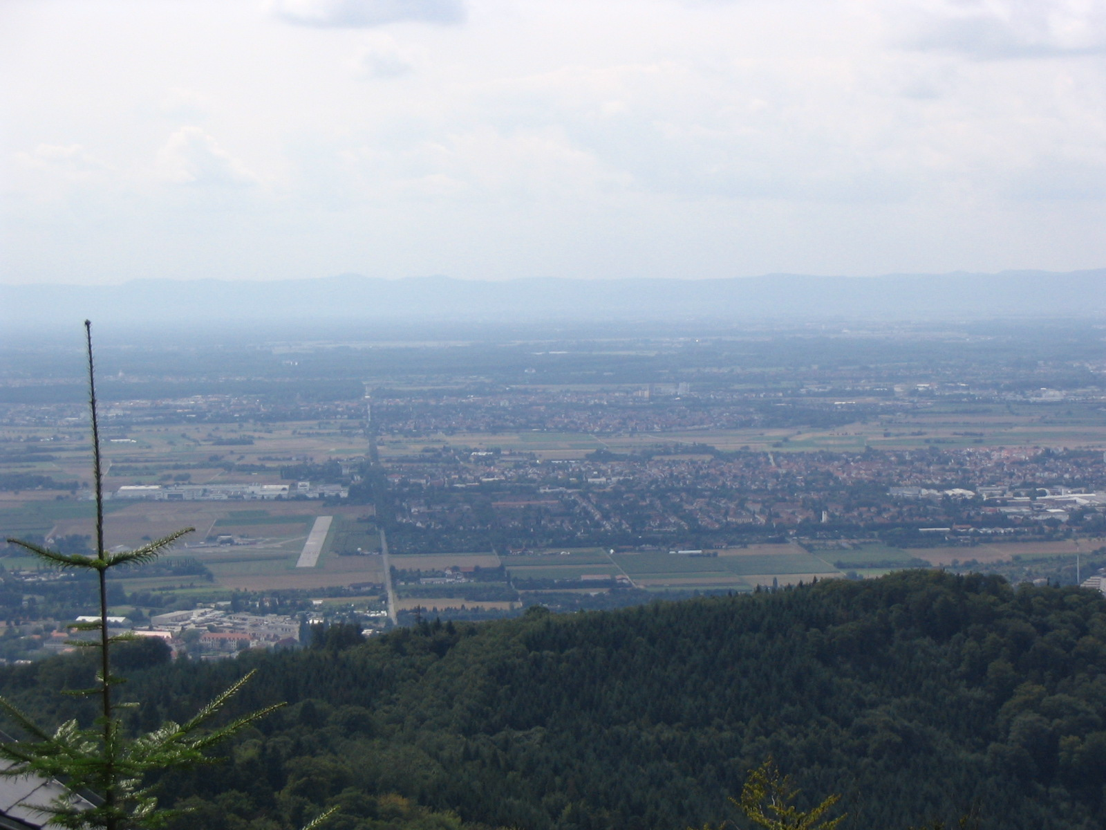 Blick vom Koenigstuhl Heidelberg in die Rheinebene